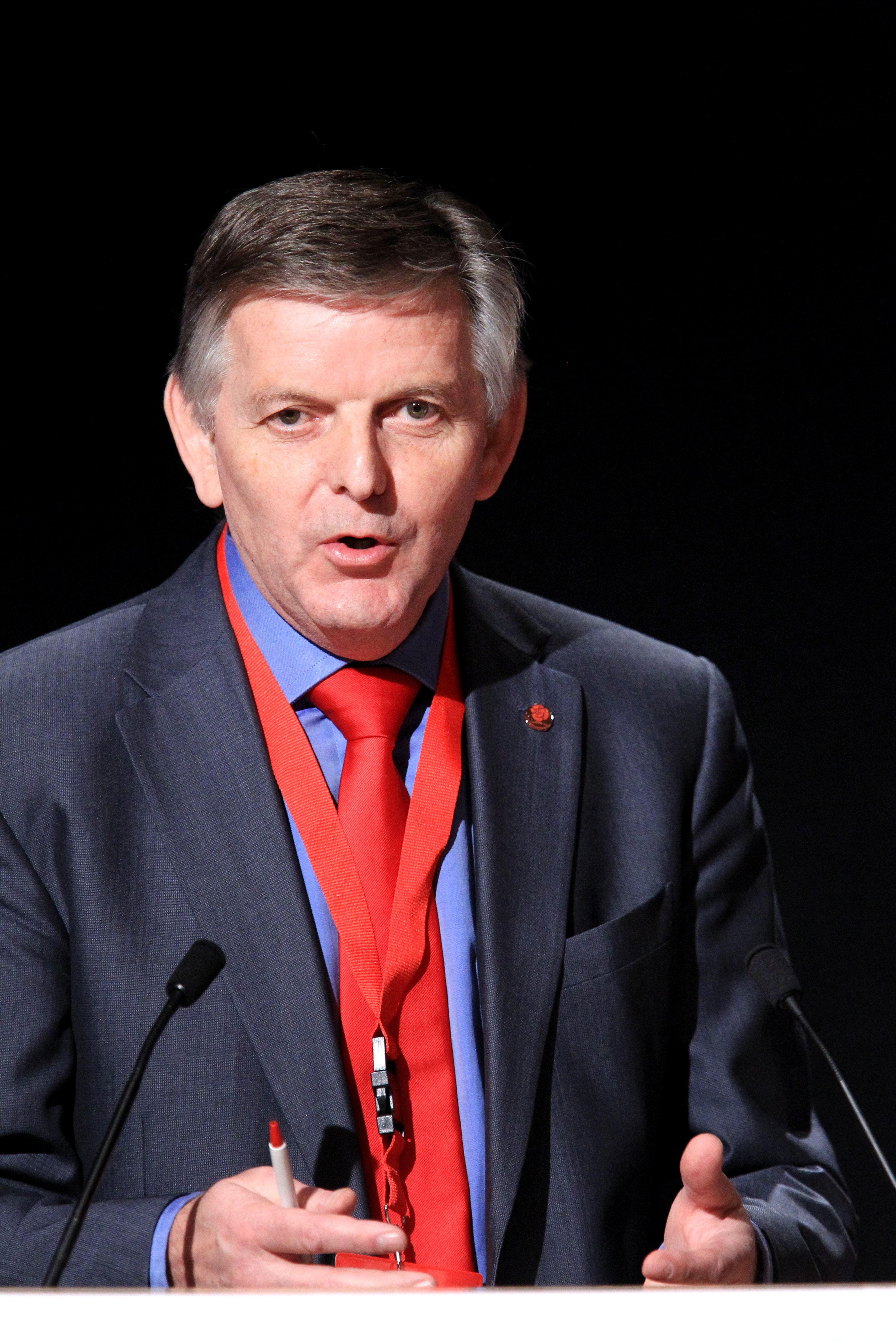 Anders Karlsson vid Nordiska Rådets session i Reykjavik på Island. 2010-11-03.